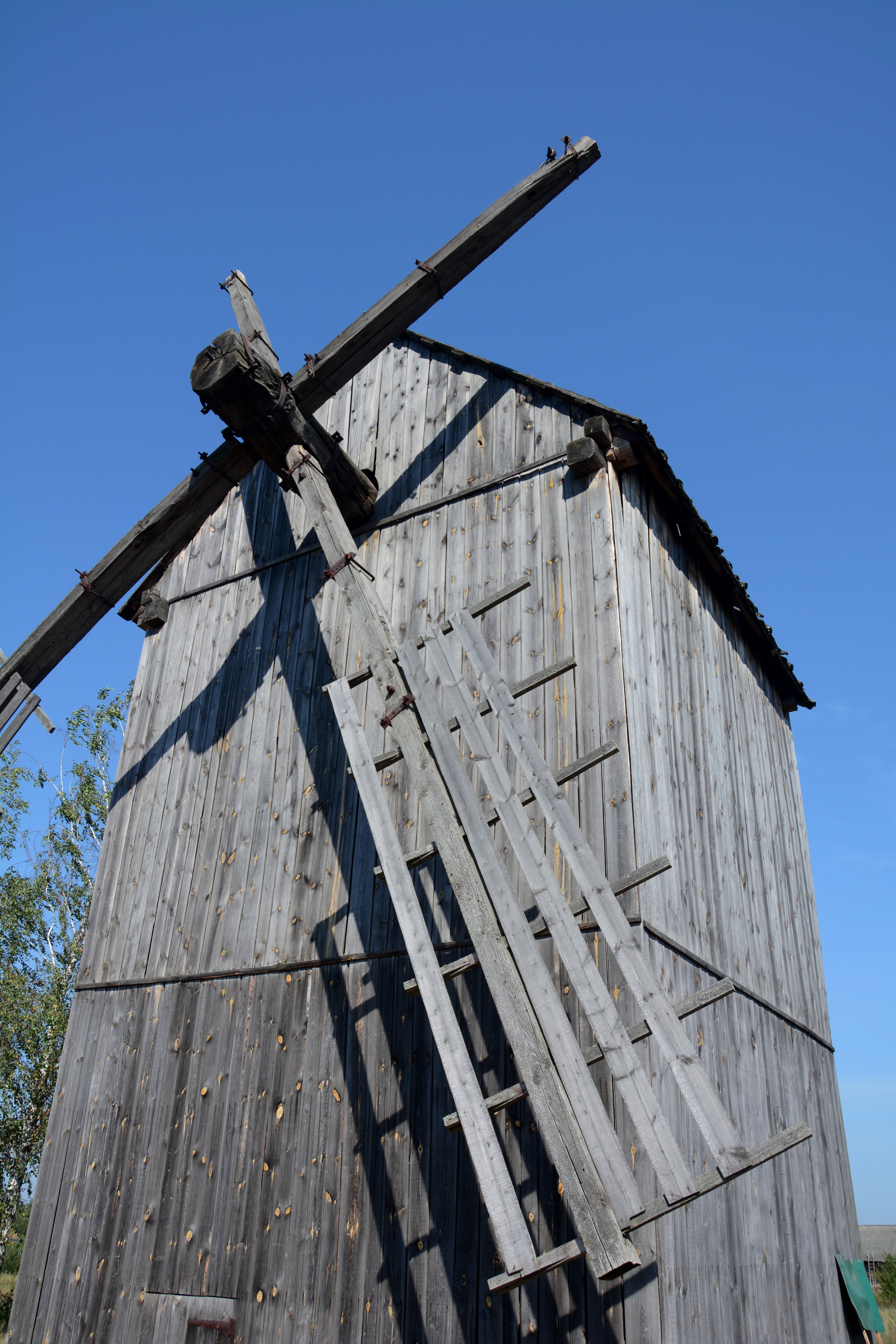 Вітряний млин (дер.), Карасин